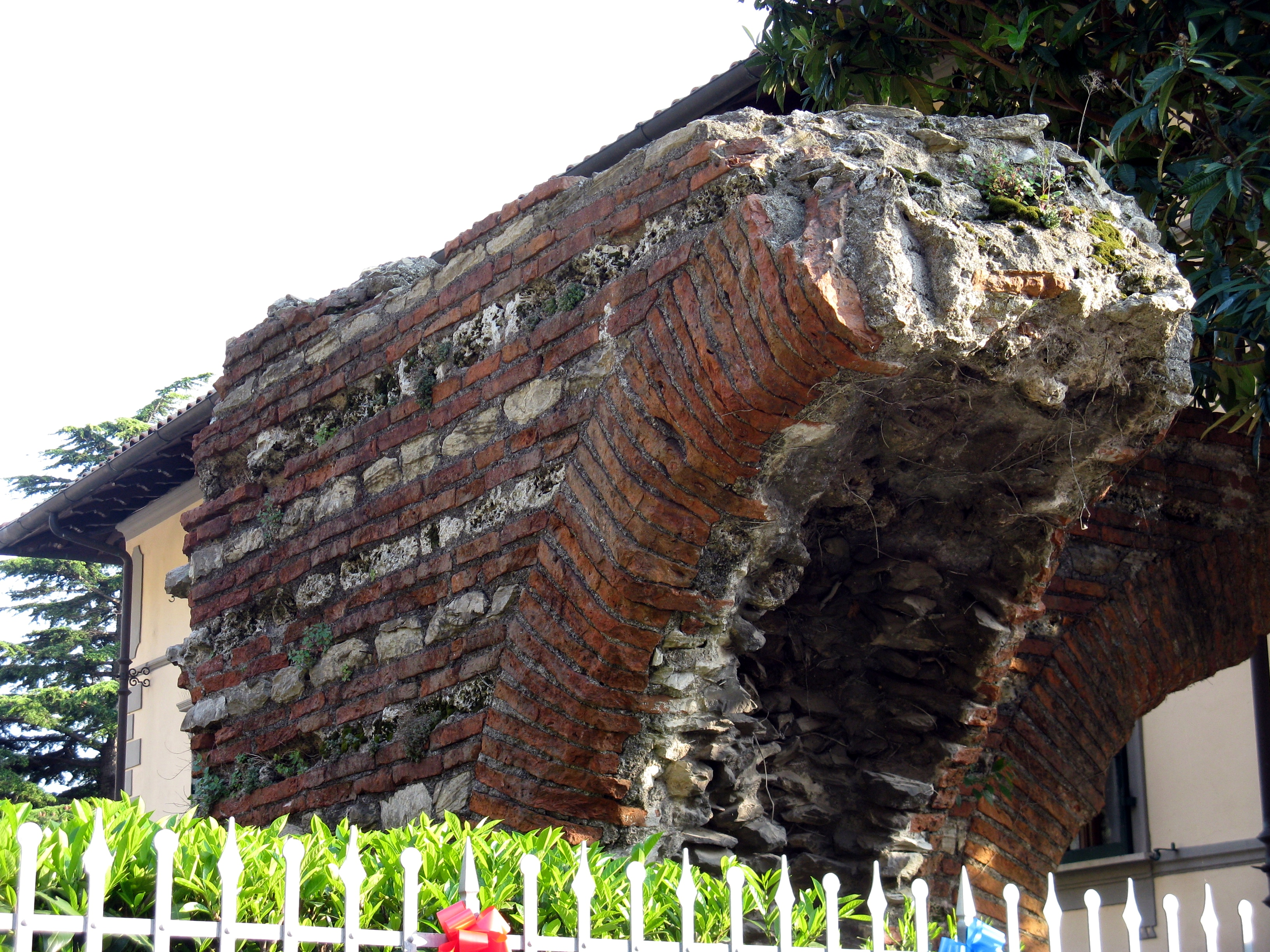 Uno dei resti (l'angolo retto) dell'acquedotto di Caldaccoli presso San Giuliano Terme (PI)